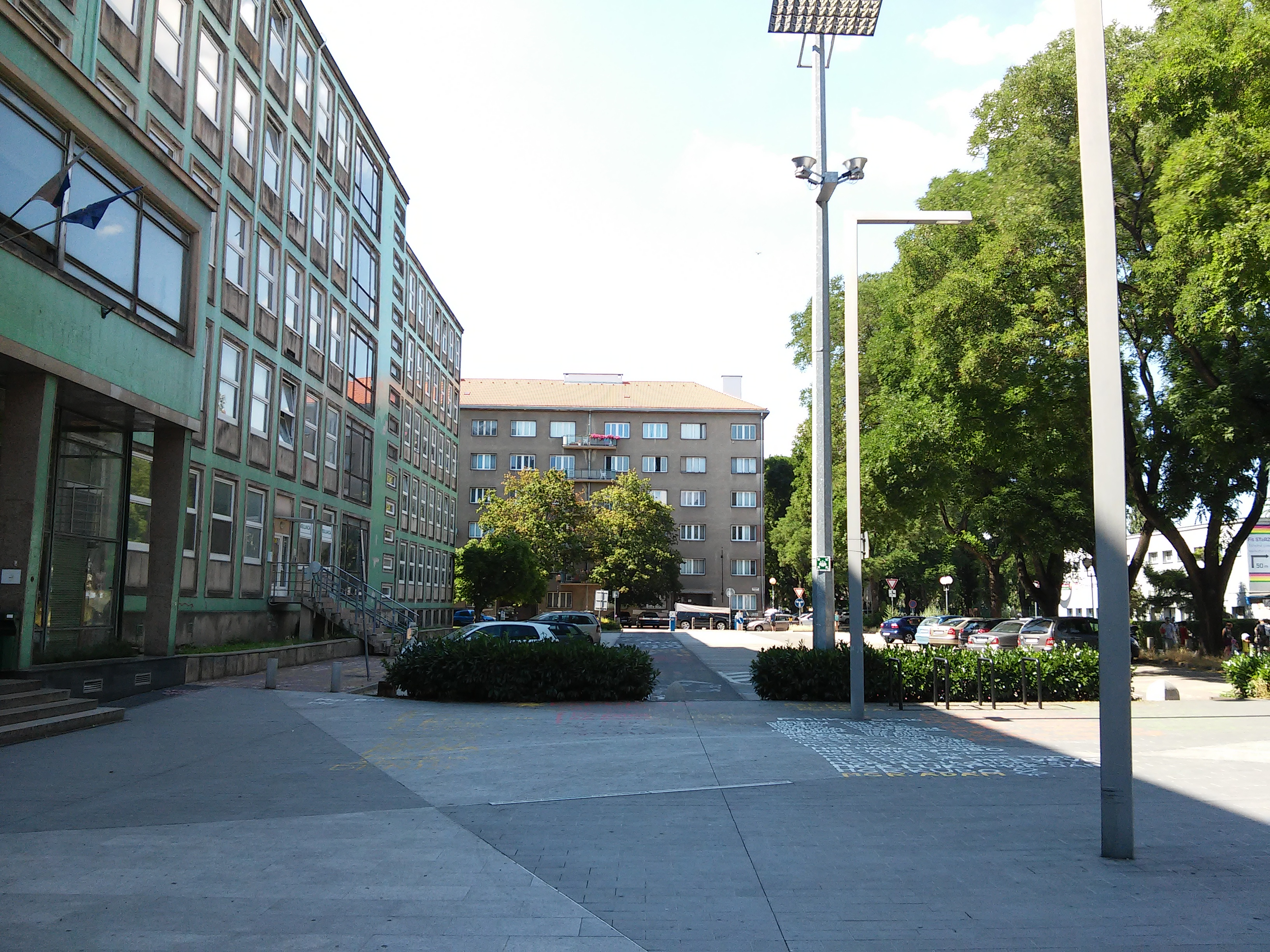 Odbojárov, Nové Mesto, Bratislava